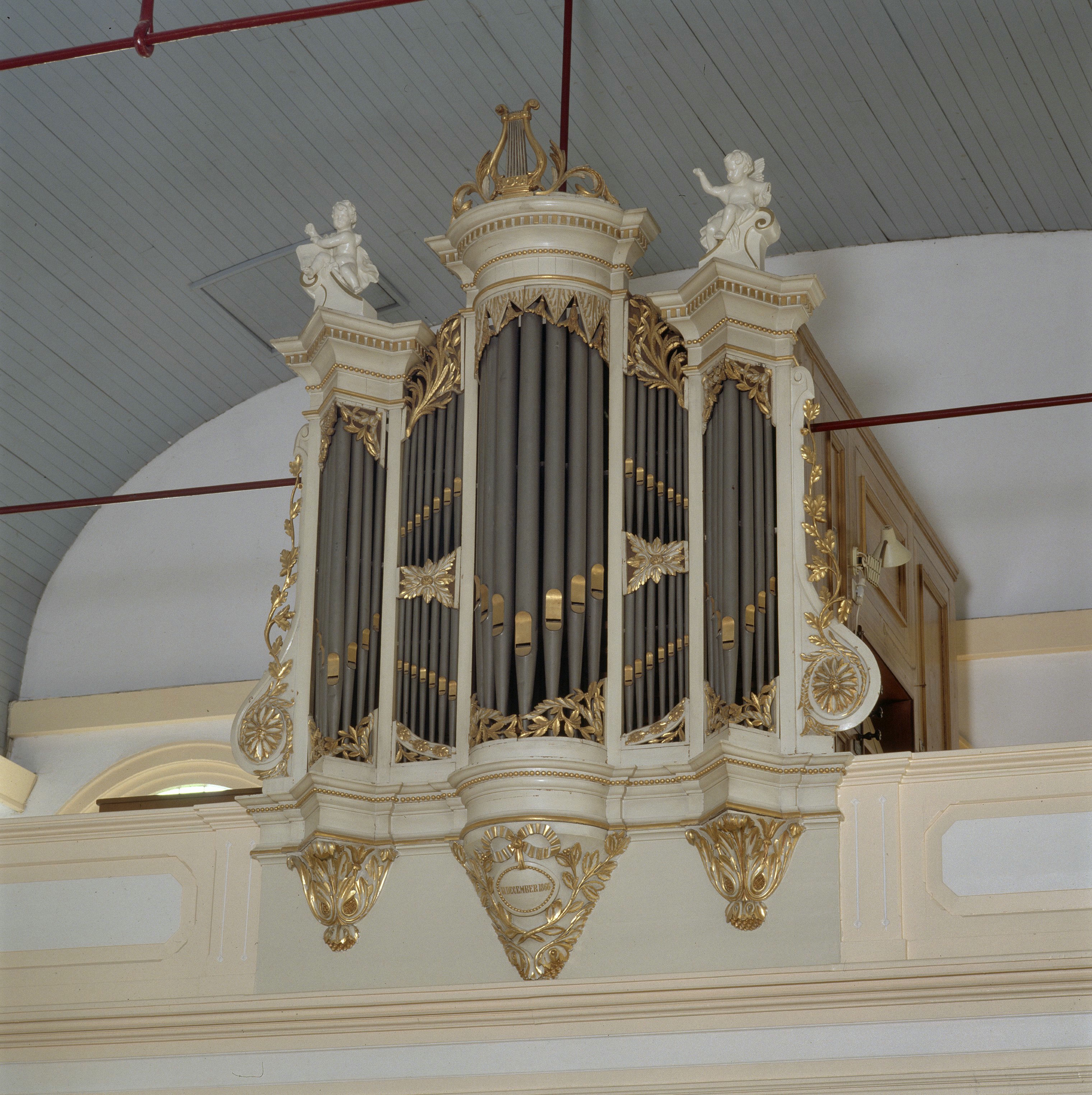 Doopsgezinde kerk: Interieur, aanzicht orgel (opmerking: Gefotografeerd voor Het Historische Orgel in Nederland 1819-1840)